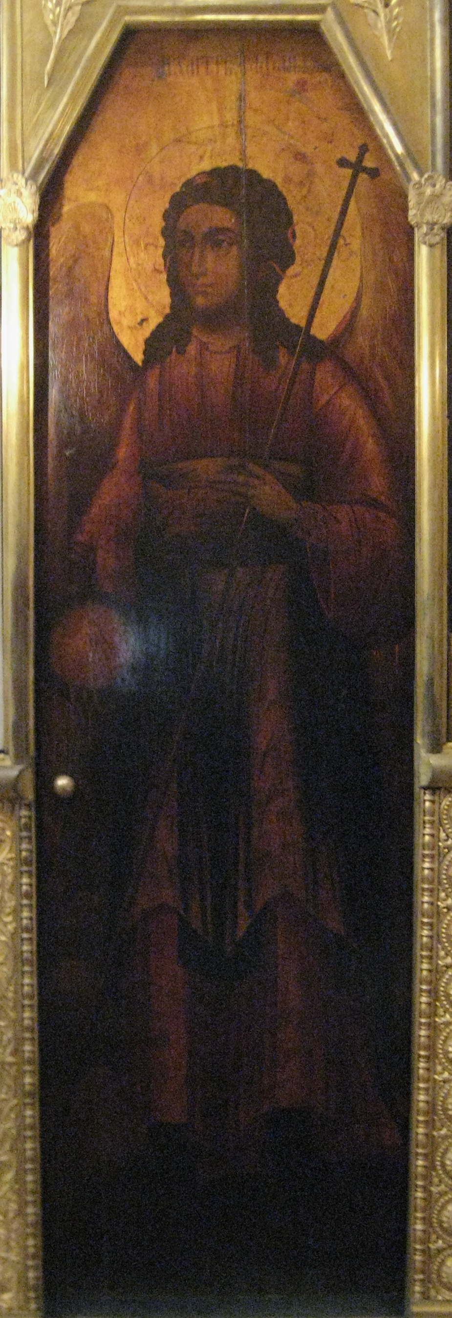 Благовещенский собор (Московский Кремль)